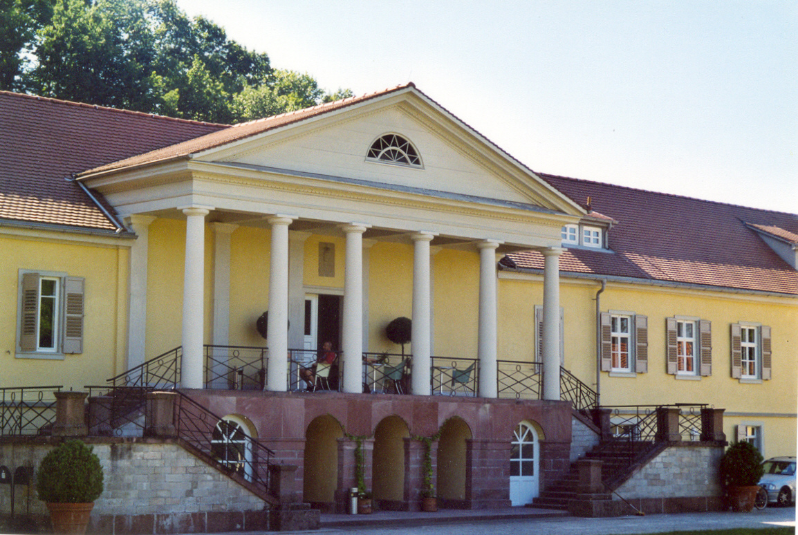 Landhaus, "Schloss" genannt, zu Bad Rotenfels (Gaggenau). Entwurf und Ausführung 1816-27 durch Friedrich Weinbrenner. Im Bild der Säulenportikus der Vorderseite des langgestreckten Gebäudes.